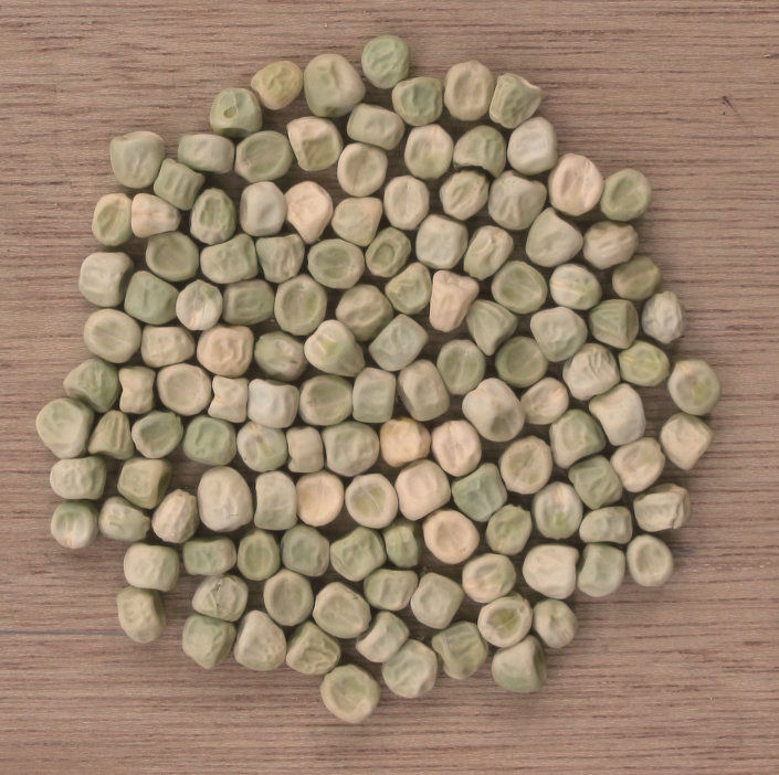 zelfgemaakte foto van zaden van kreukzadige erwt 'Kelvedon Wonder'